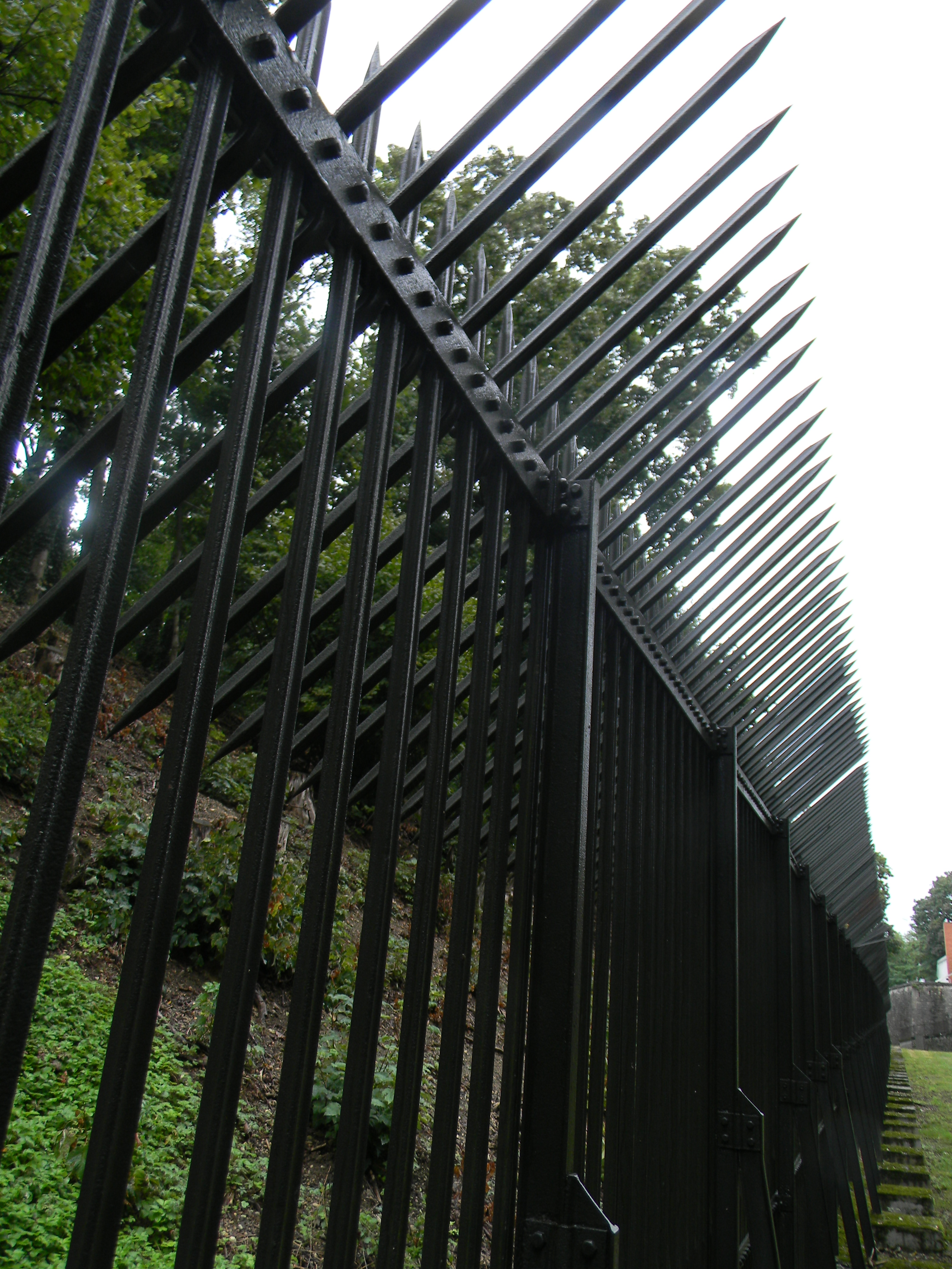 La grille défensive en fonte et acier du Fort de Saint-Priest, longue de 310m et haute de 3,33m.